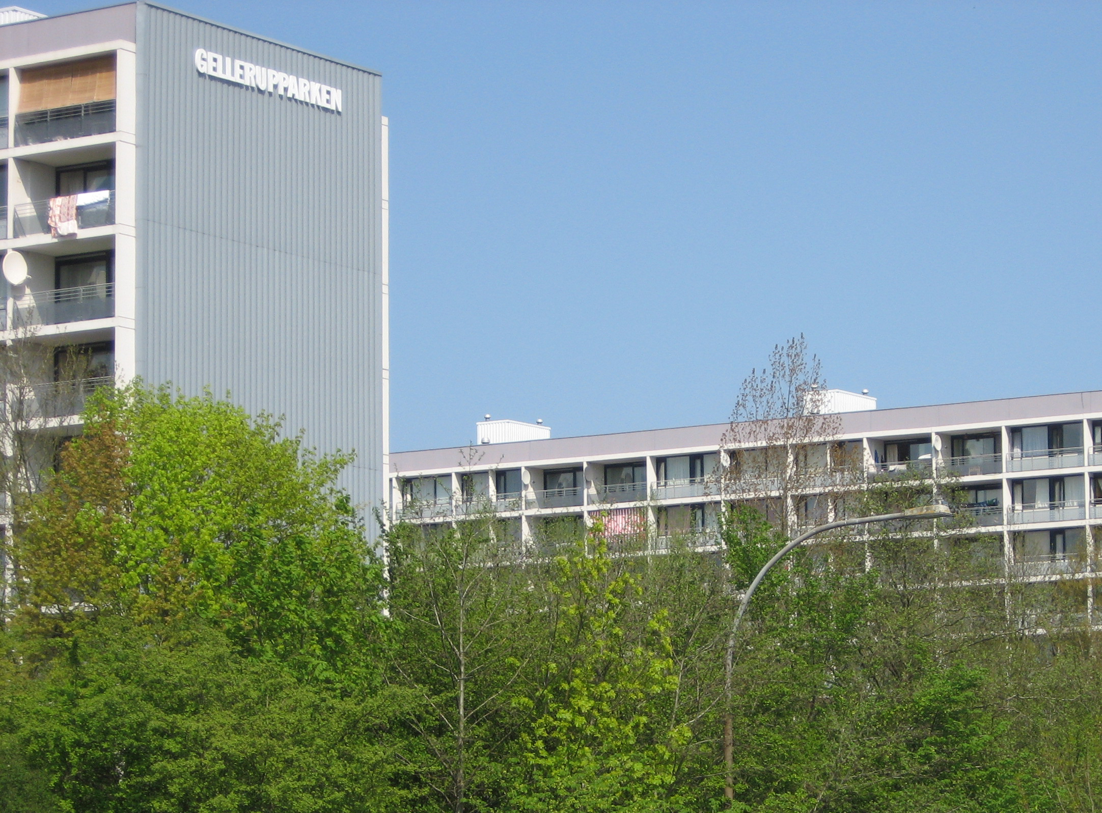 Gellerupparken in Århus, Denmark.